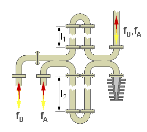 Arbeitsprinzip eines Diplexers